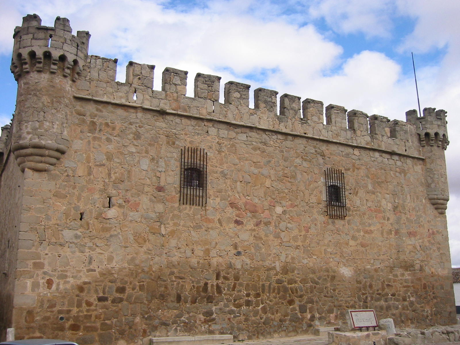 Castillo de los Condes de Orgaz (Orgaz, Toledo).